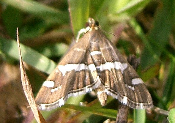 Hymenia recurvalis1.jpg